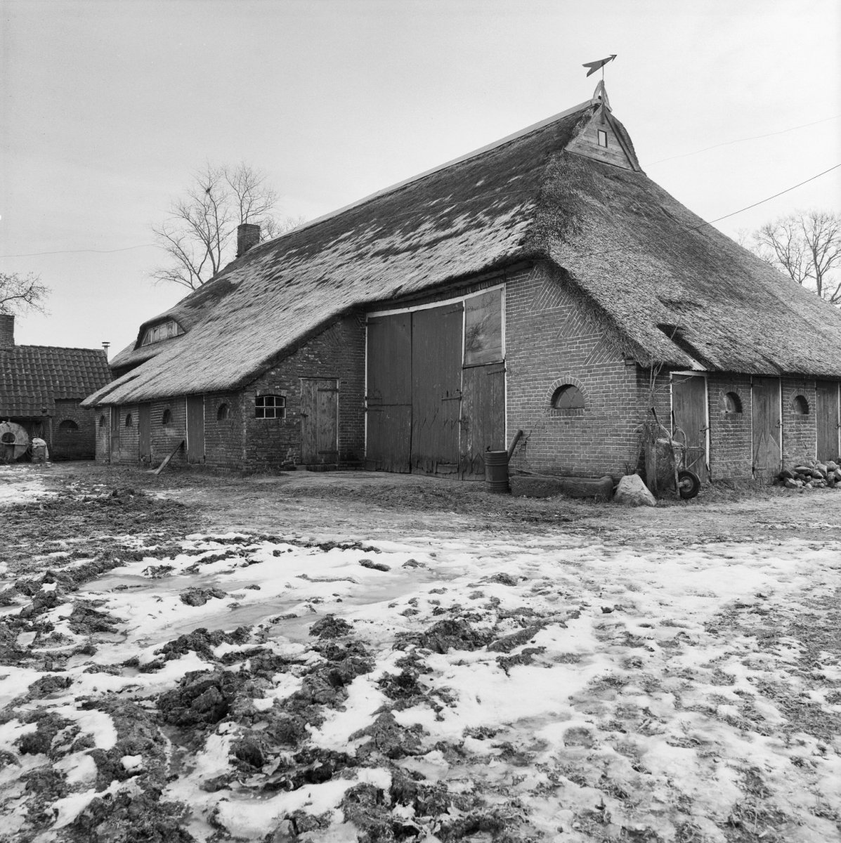 achtergevel